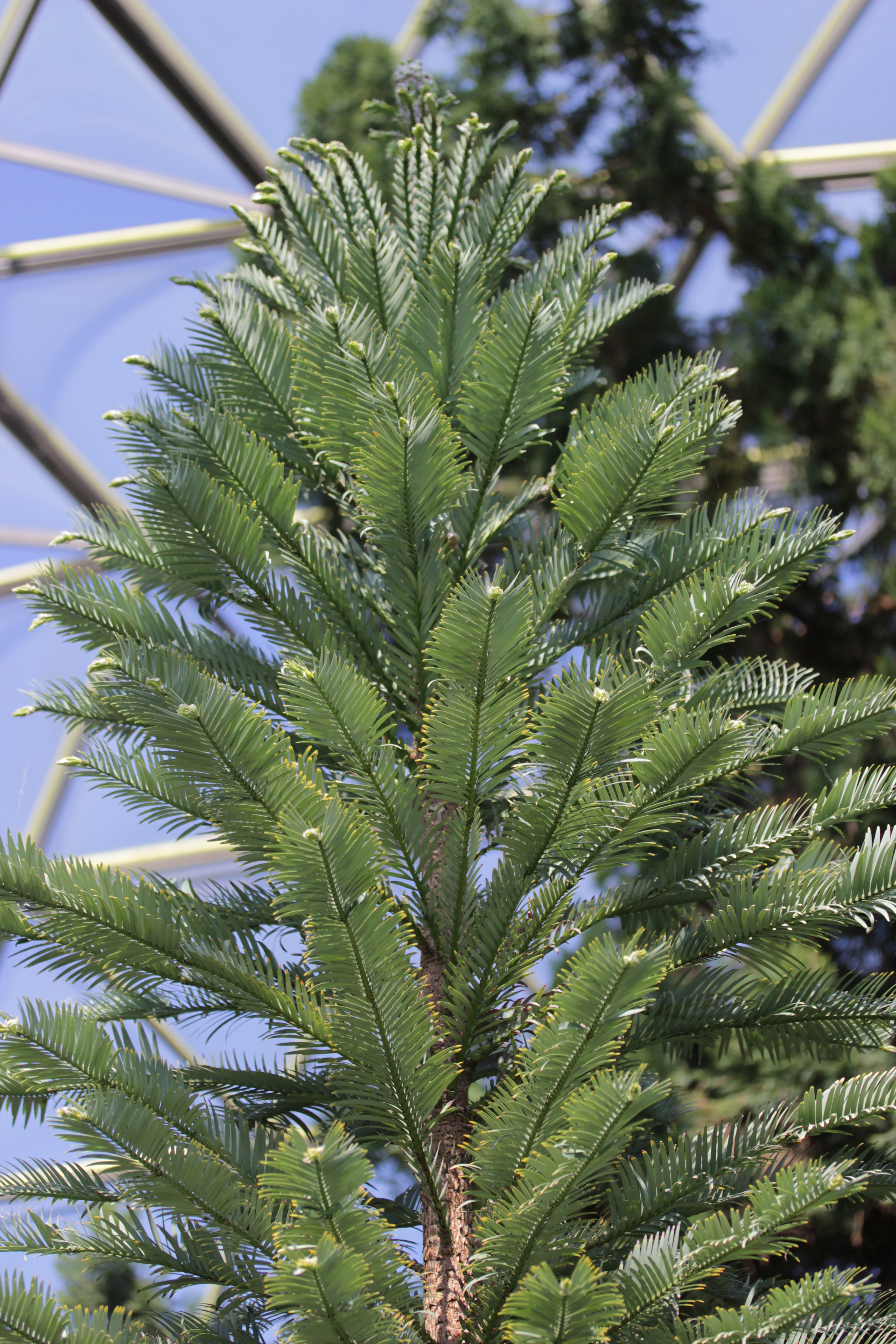 Wollemi Pine - Wollemia nobilis